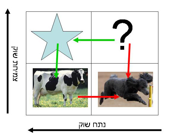 מטריצת צמיחה- נתח שוק המתארת את ארבע היחידות העיסקיות האפשריות בתאגיד: פרה חולבת, כוכב, כלבלב וסימן שאלה. חיצים ירוקים מורים על הכיוון הרצוי, חיצים אדומים מורים על הכיוון הלא רצוי.